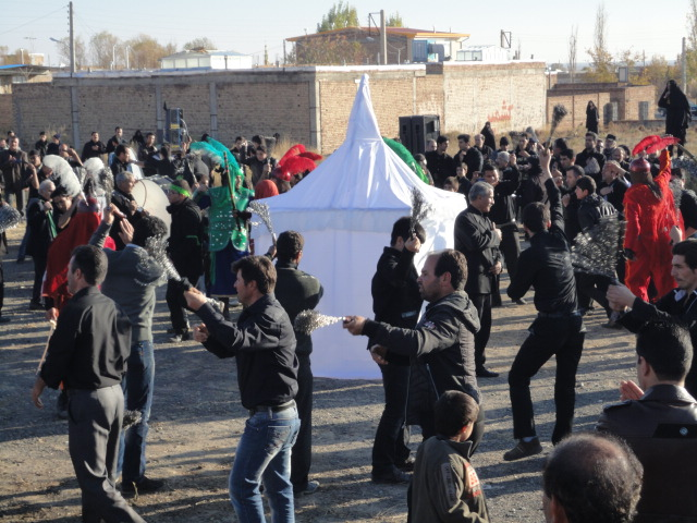 خیمه سوزان روز عاشورا در روستای شنگل آباد